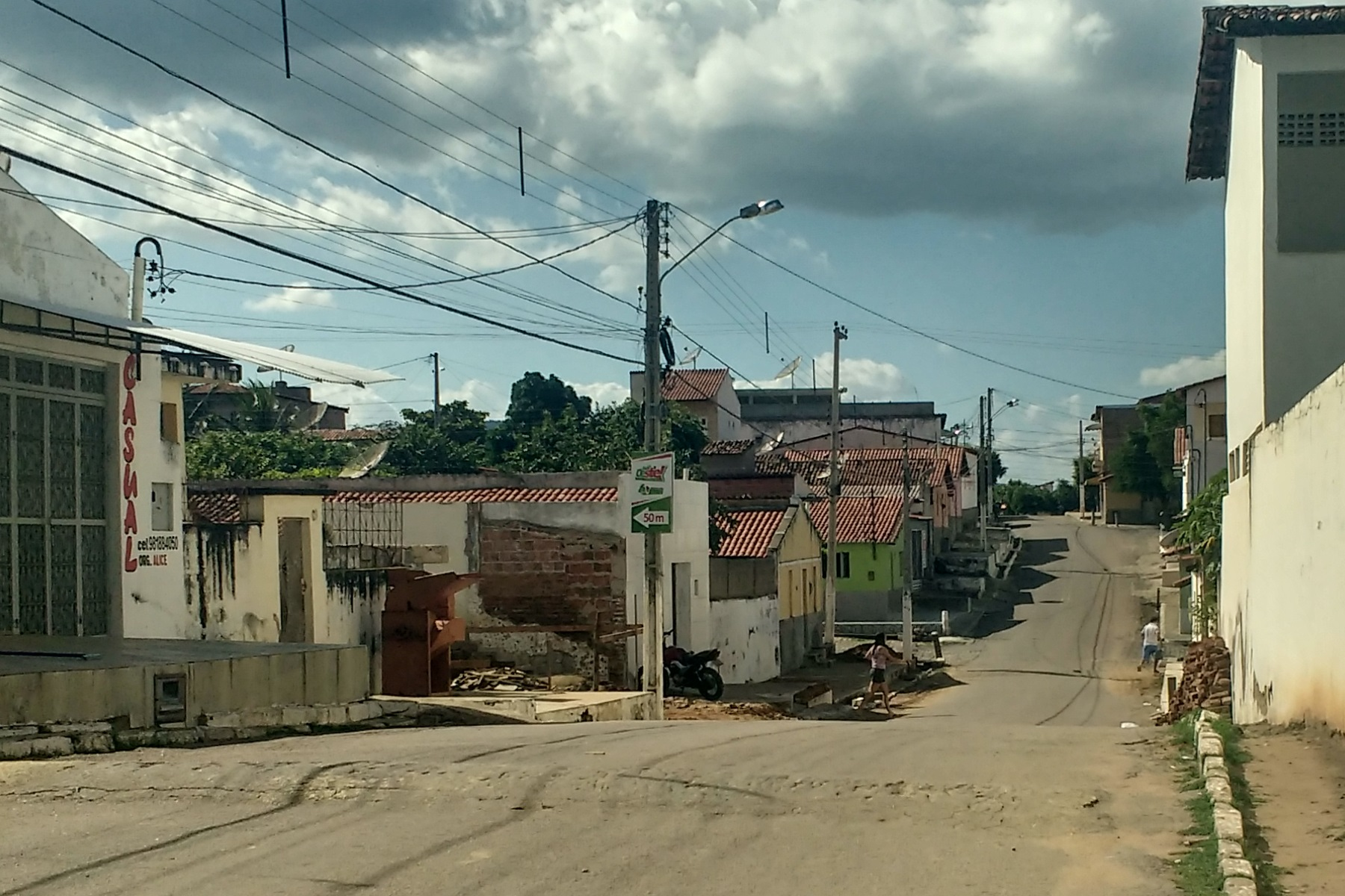 Rua Princesa Isabel, Doutor Severiano, Rio Grande do Norte (Brasil).